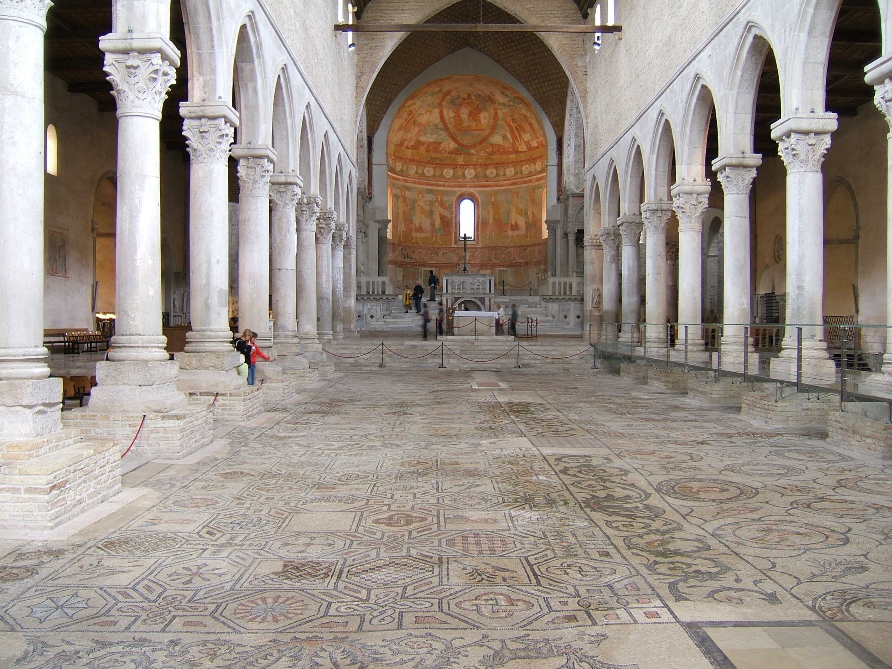 Basilica di Poppo